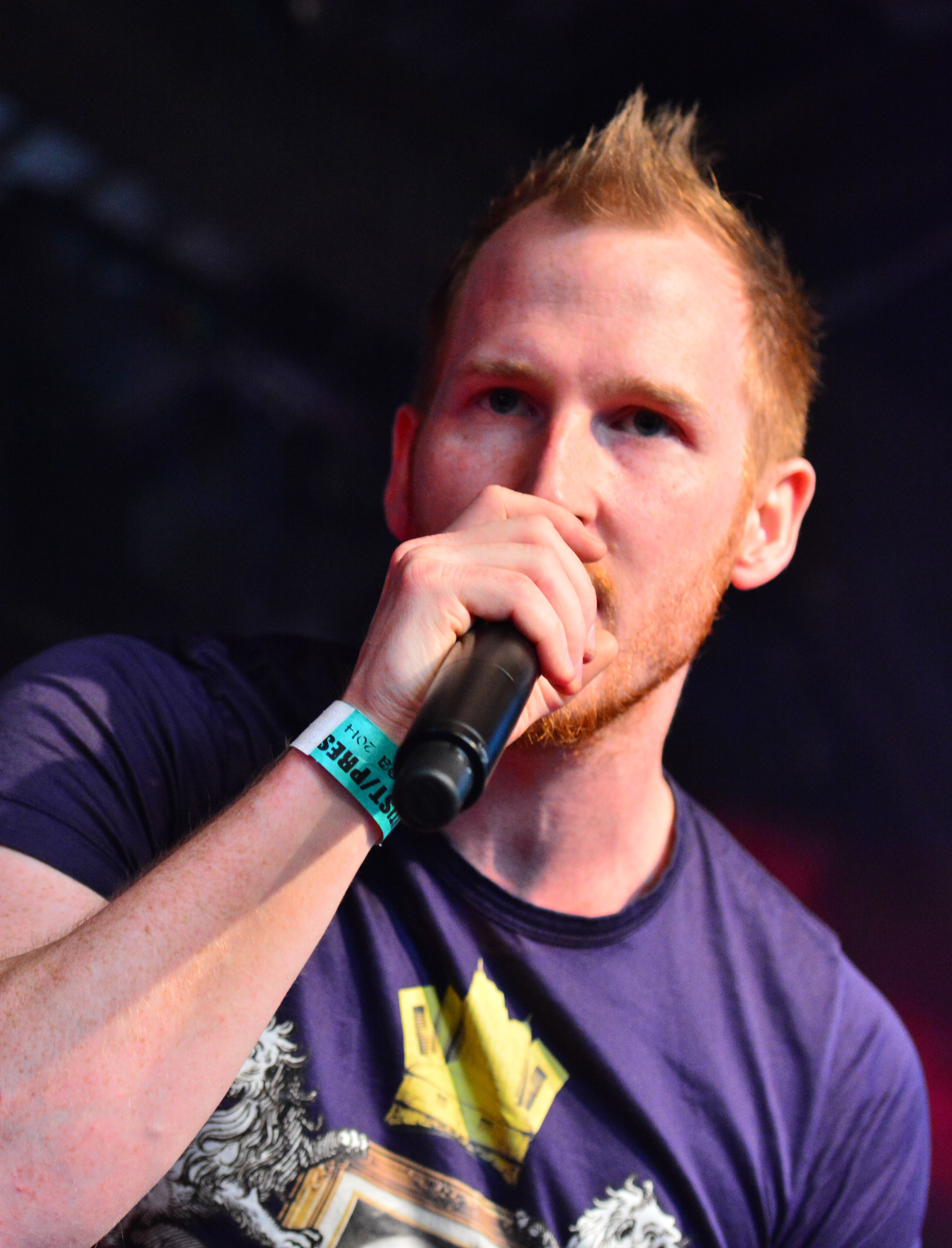 Nick Tart von Diamond Head beim Headbangers Open Air 2014